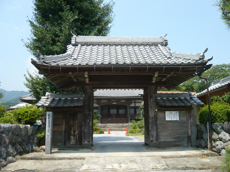 垂井町岩手、明泉寺